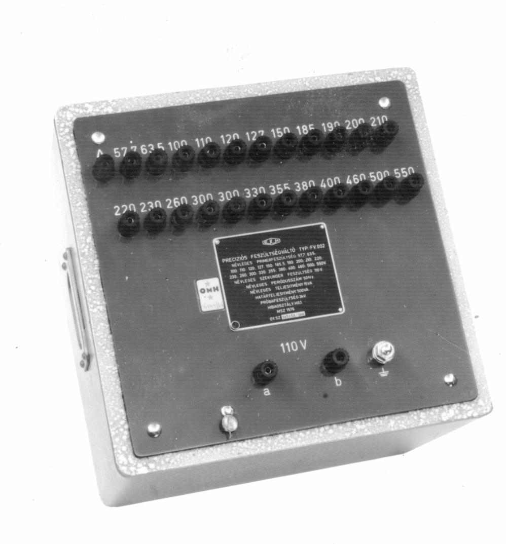 Feszültségváltó